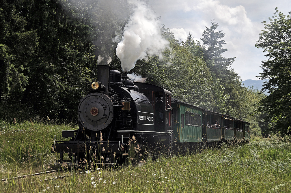 Alberni June 16 and 17 2013 179x4RP